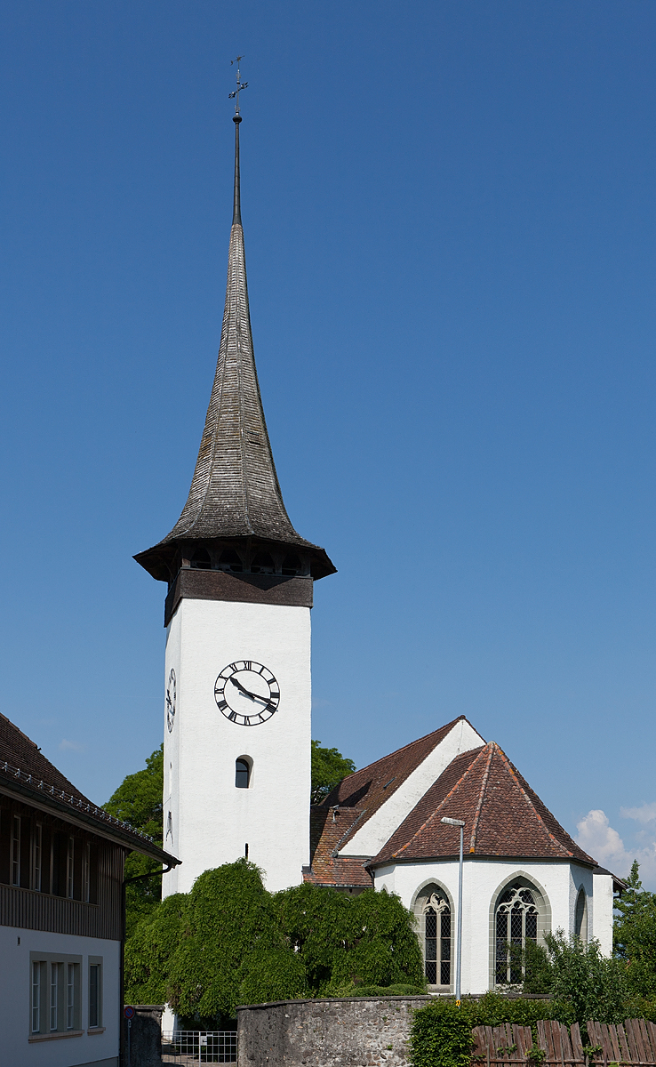 Reformierte Kirche in Kerzers (FR)